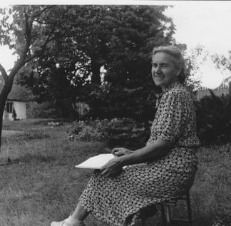 Hana Dostalová (1890-1981), česká malířka, ilustrátorka, textilní a sklářská návrhářka